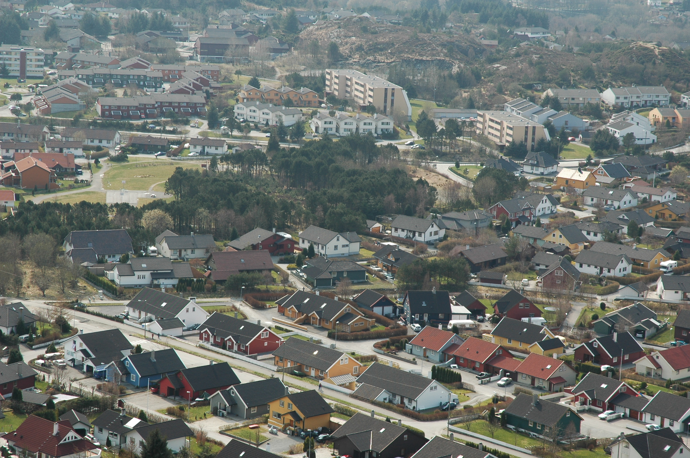 Bleikemyr i Haugesund